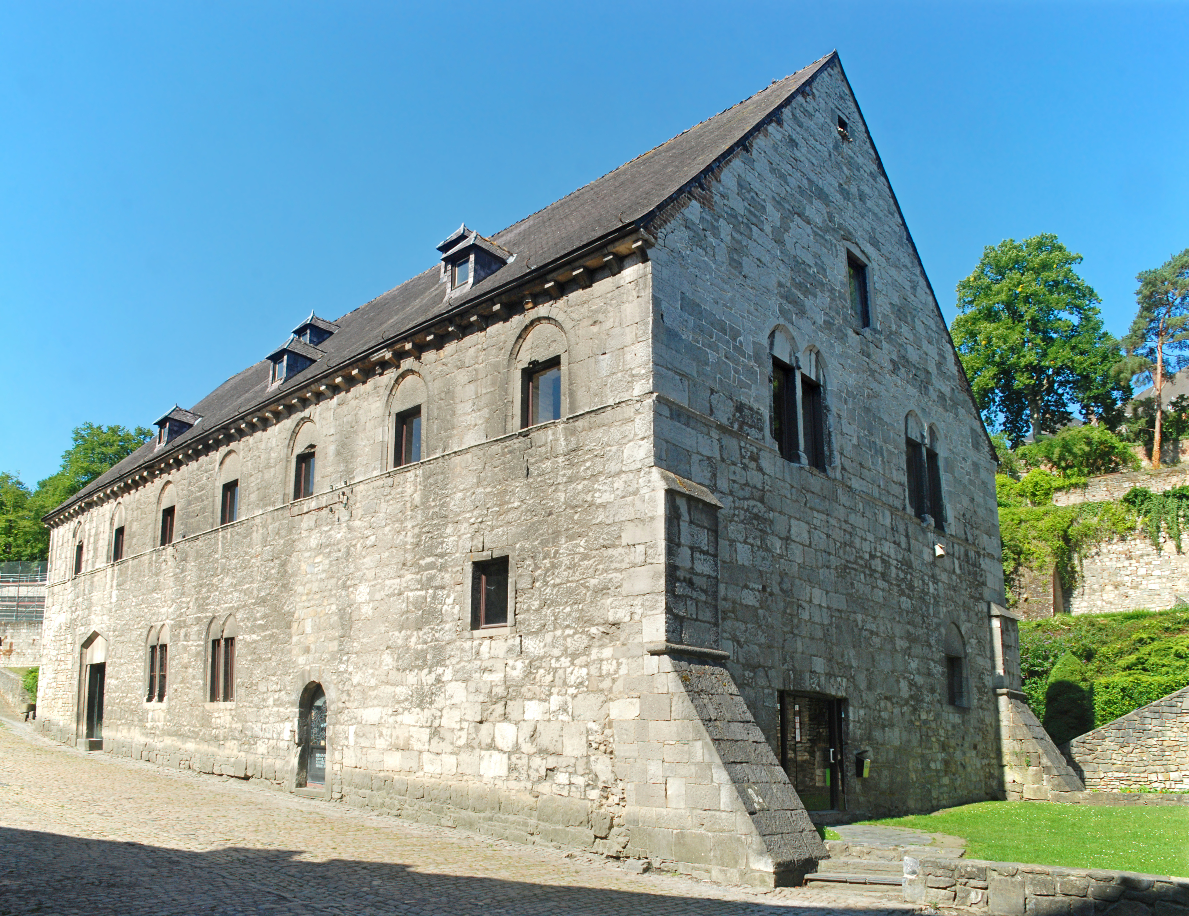 Belgique - Province de Namur - Abbaye de Floreffe - Moulin-brasserie